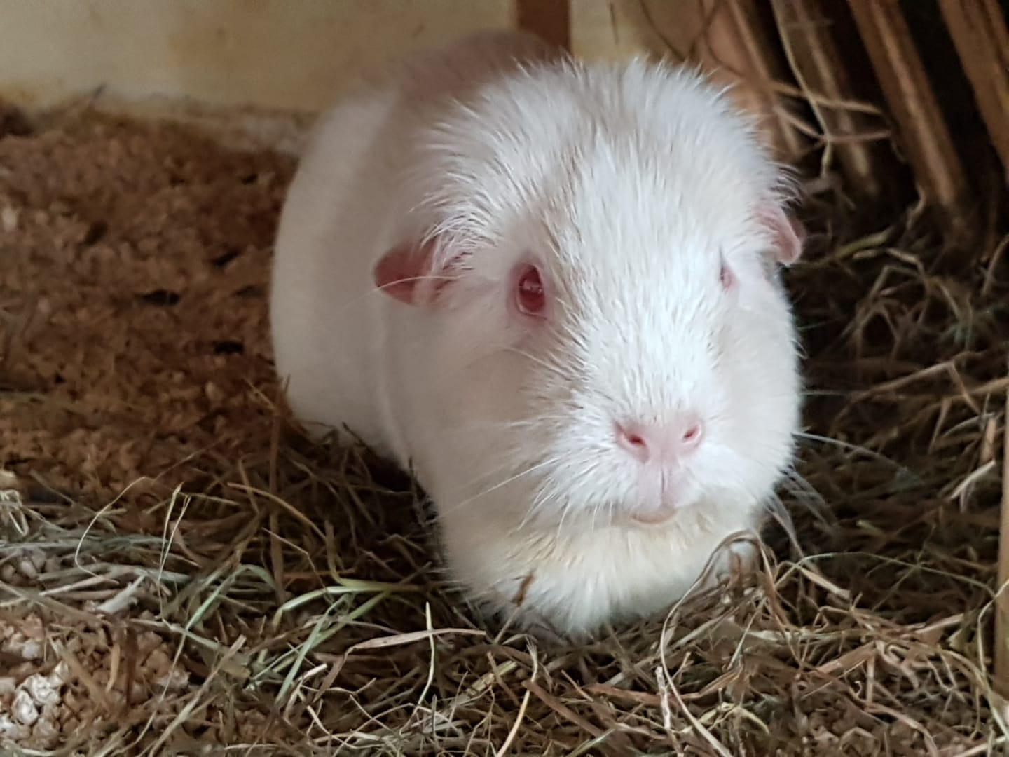 Cavia porcellus (guinea pig) - weiss